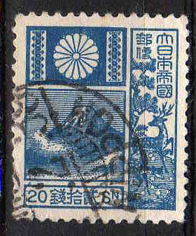 japanese stamp（日本の普通切手）富士鹿切手と呼ばれる大正時代の普通切手である。